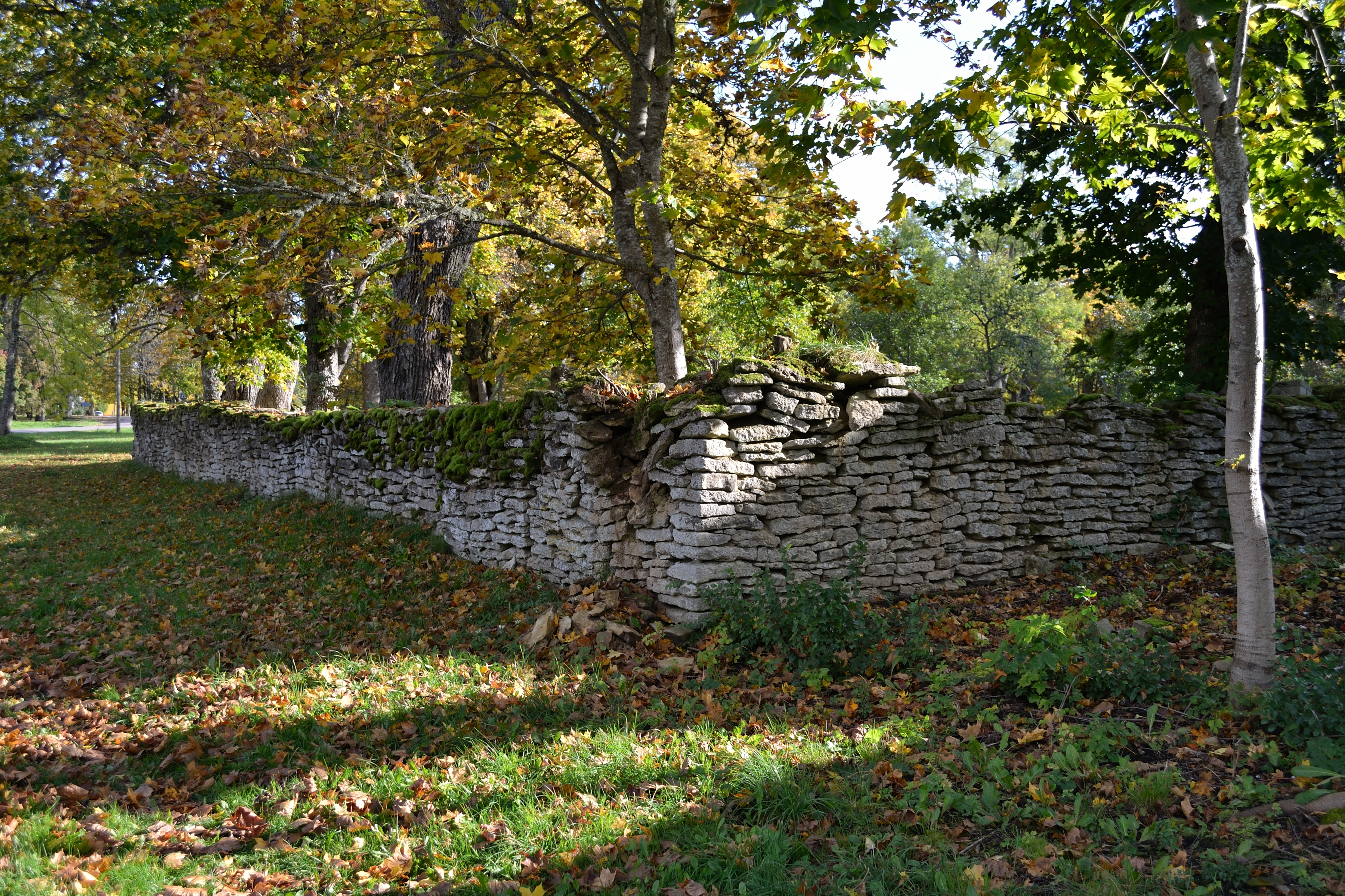 Juuru pastoraadi piirdemüürid